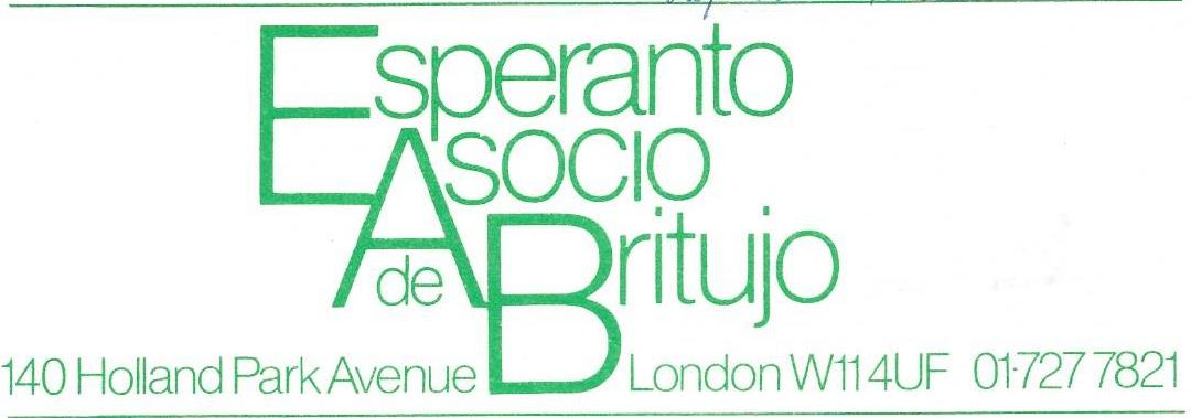 Leterfronto de "Esperanto Asocio de Britujo", 1988